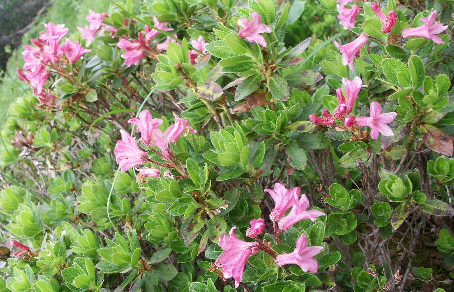 Bewimperte Alpenrose (Rhododendron hirsutum). Fundort: Nähe Liezener Hütte, Wörschach, Österreich